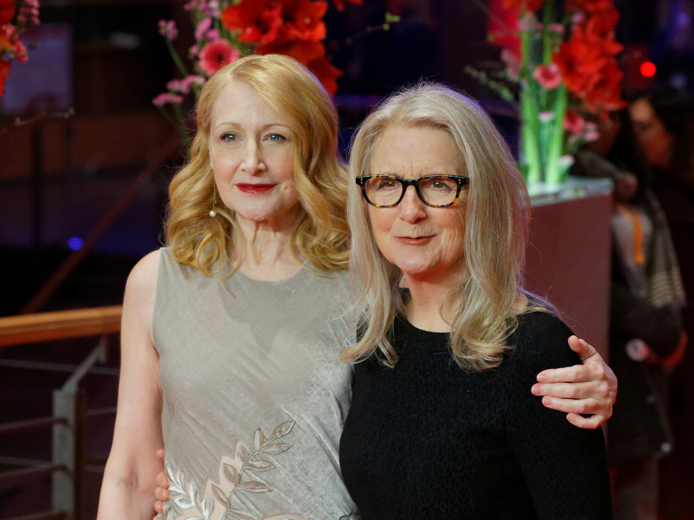 Patricia Clarkson und Sally Potter bei der Weltpremiere von The Party im Rahmen der Berlinale 2017